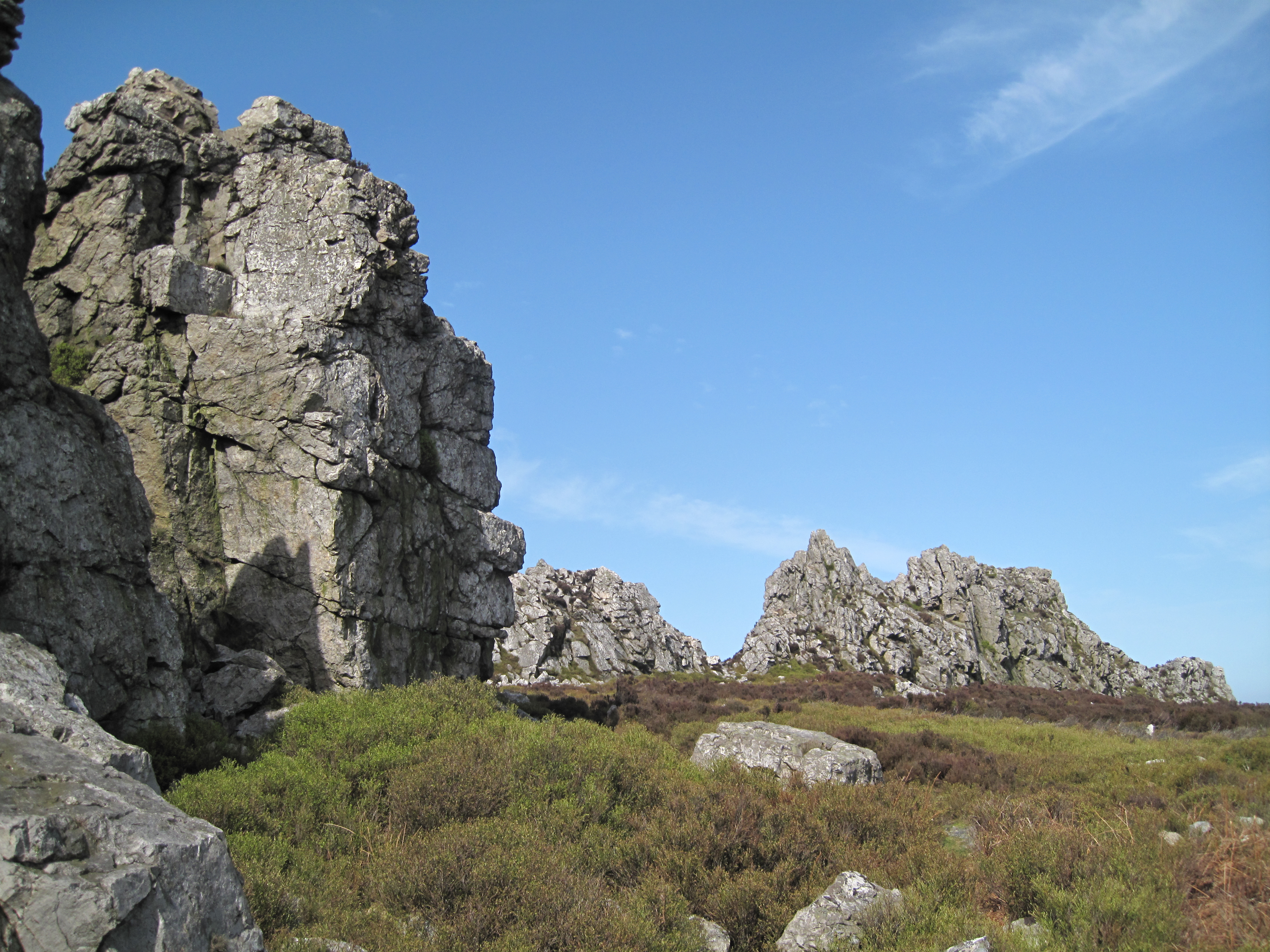 Stiperstones